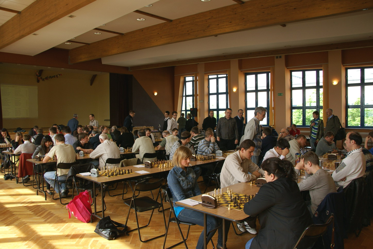 Finał rozgrywek o Drużynowe Mistrzostwo Kujawsko-Pomorskiego Związku Szachowego w sezonie 2009/10. 11 runda III ligi, Toruń - Szkoła Podstawowa nr 5, 9 maja 2010.